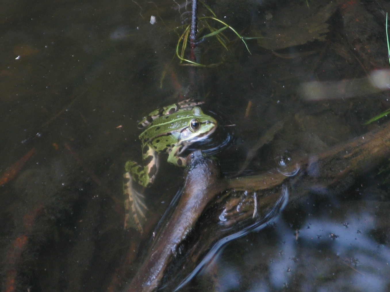 Żaba z rodzaju Pelophylax w stawie w Lasku Chropaczowskim w Świętochłowicach-Chropaczowie.